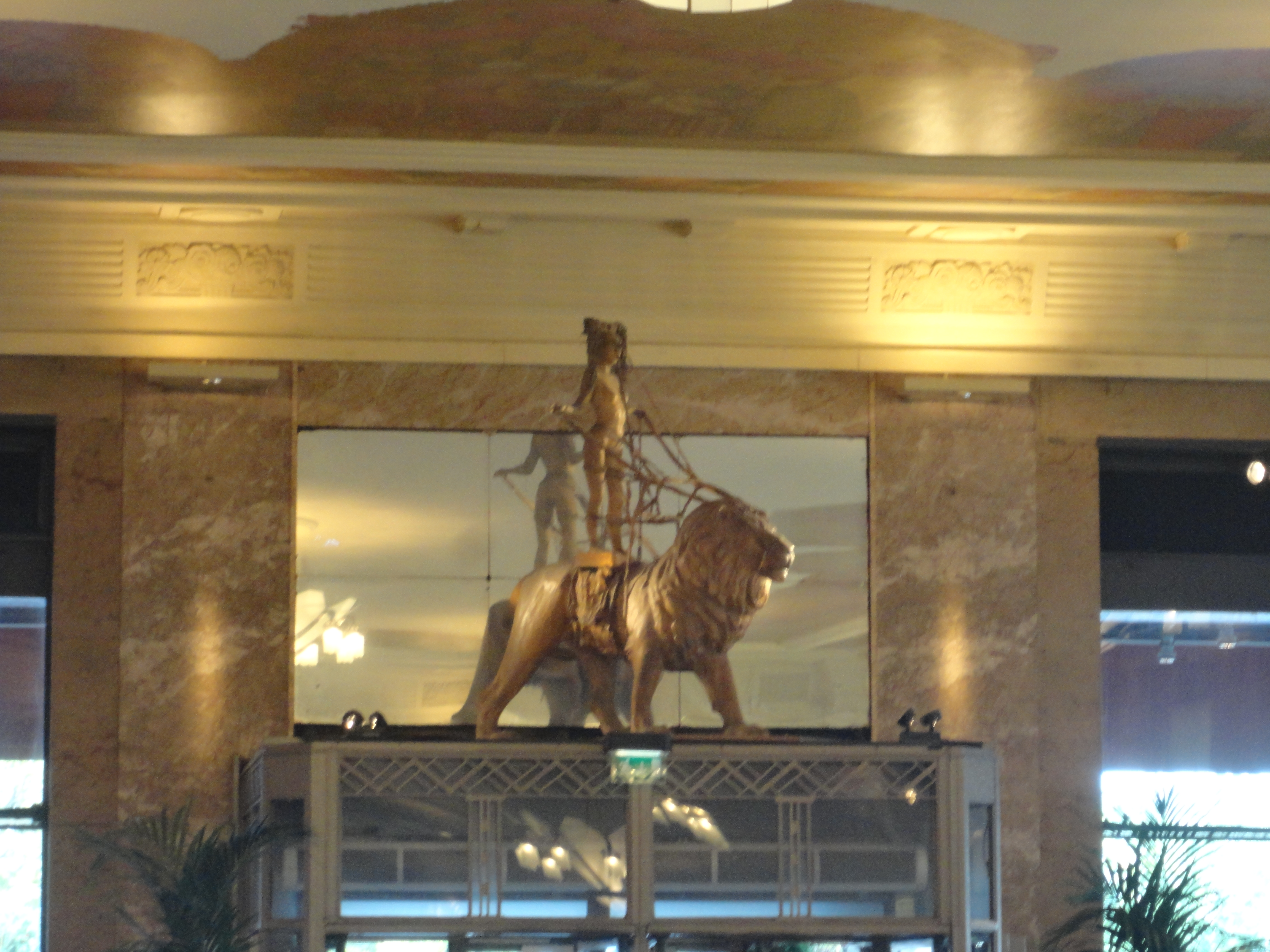 Décoration, statue avec un lyon dans la salle de la Brasserie Georges à Lyon (France).